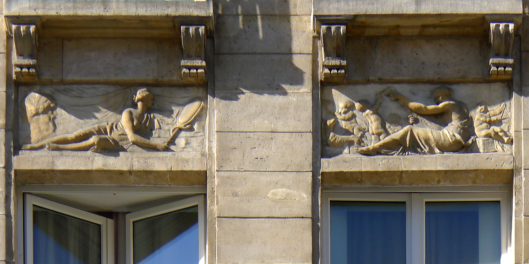 Rue Vieille du Temple (n°137 : bas-reliefs) - Paris III